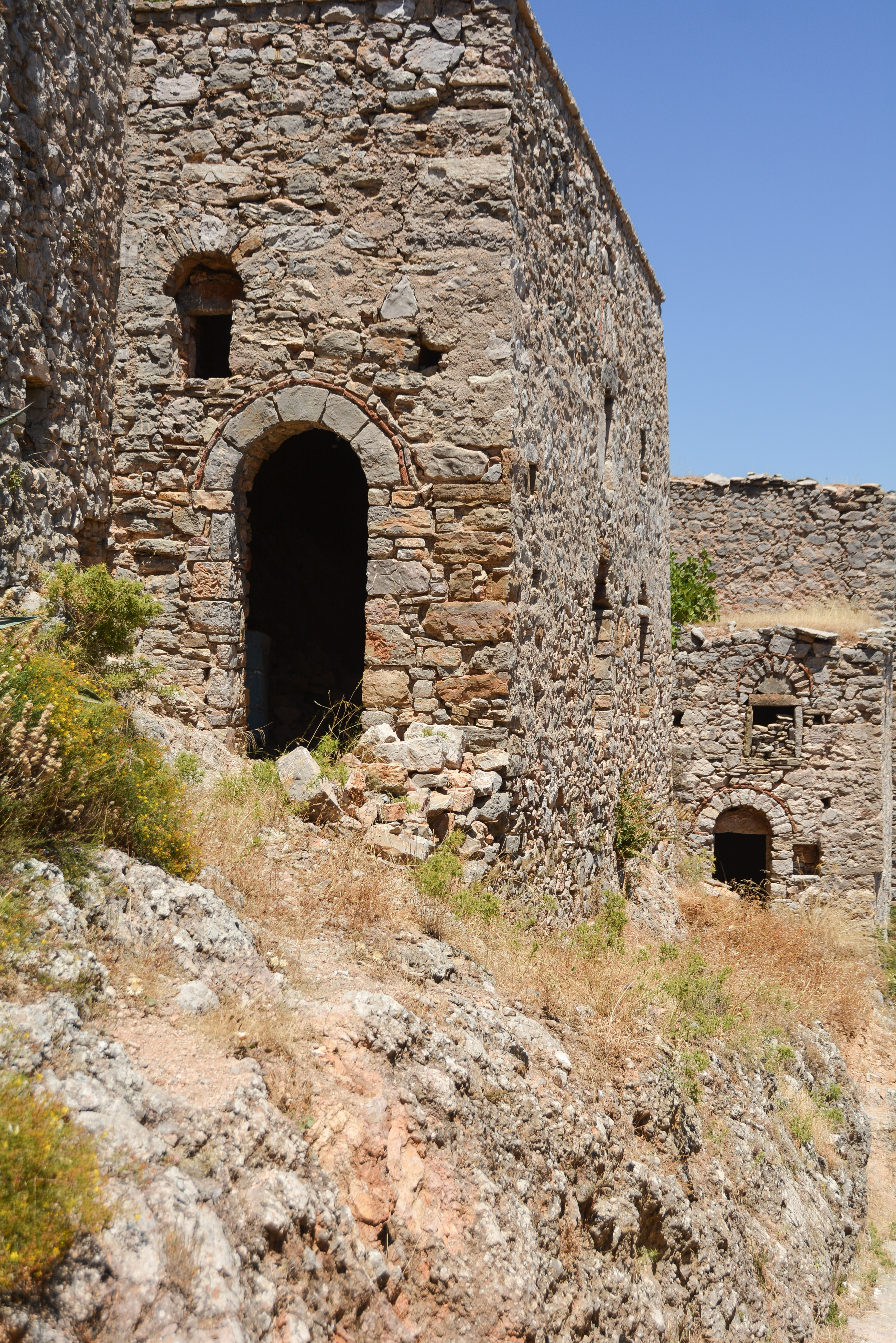 Ανάβατος«Ανάβατος Χίου»